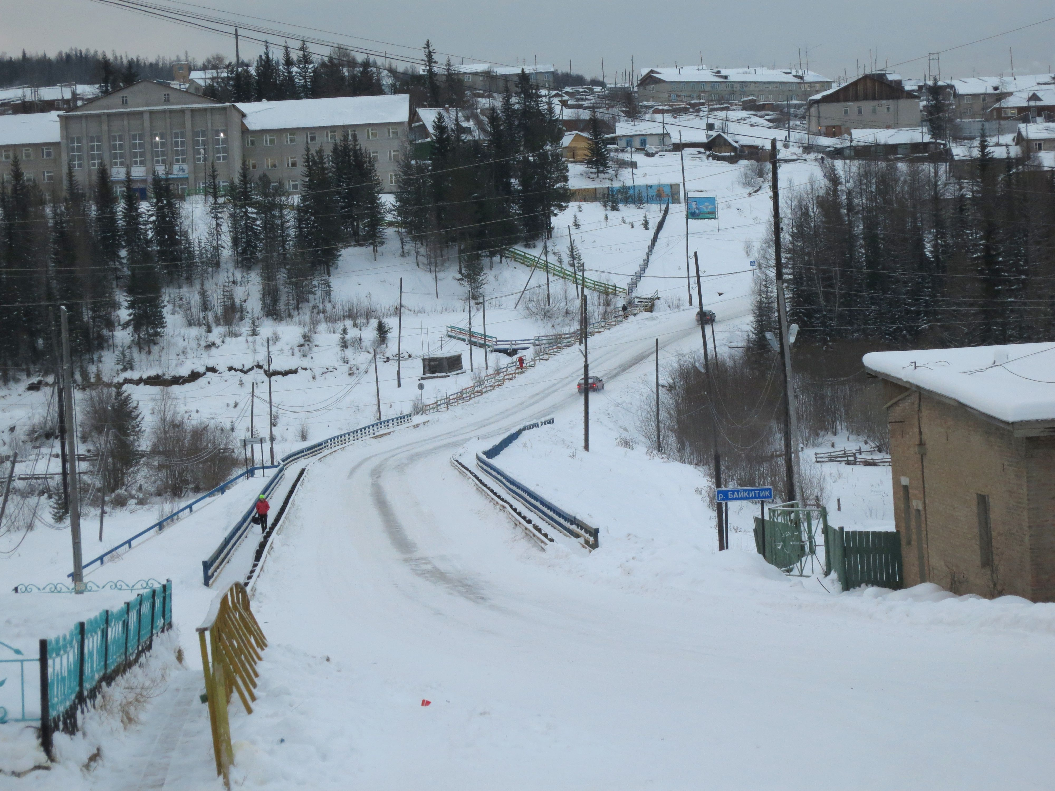 Байкит